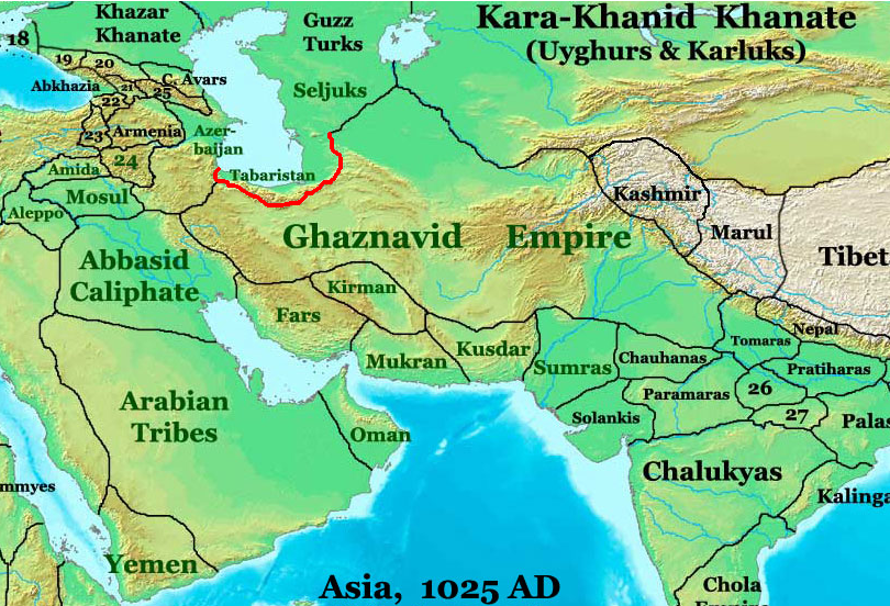 مازِرونی: باکالیجار ِسامون